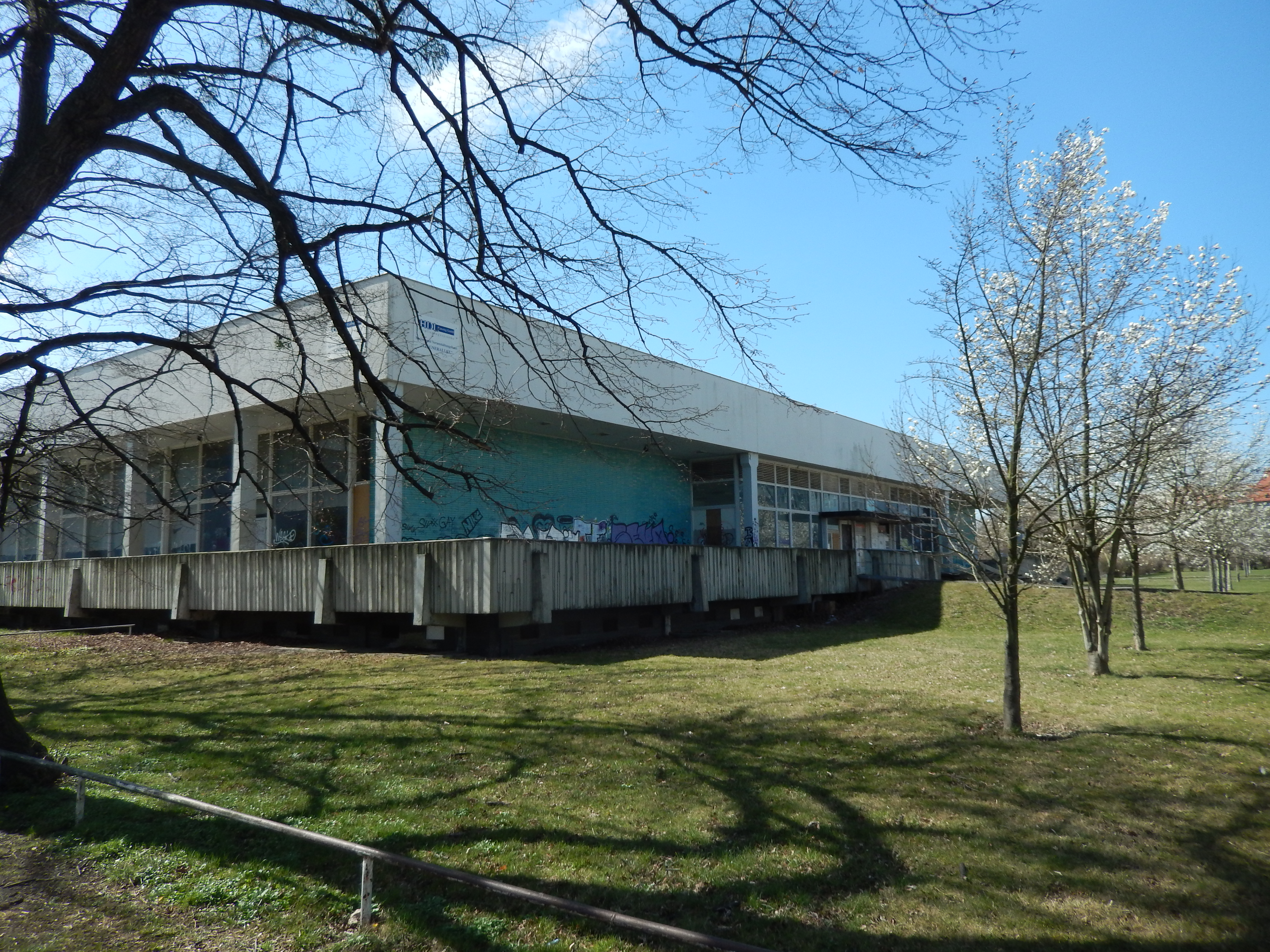 Dresden, Robotrongebäude, ehemalige Betriebsgaststätte, Kantine, April 2018